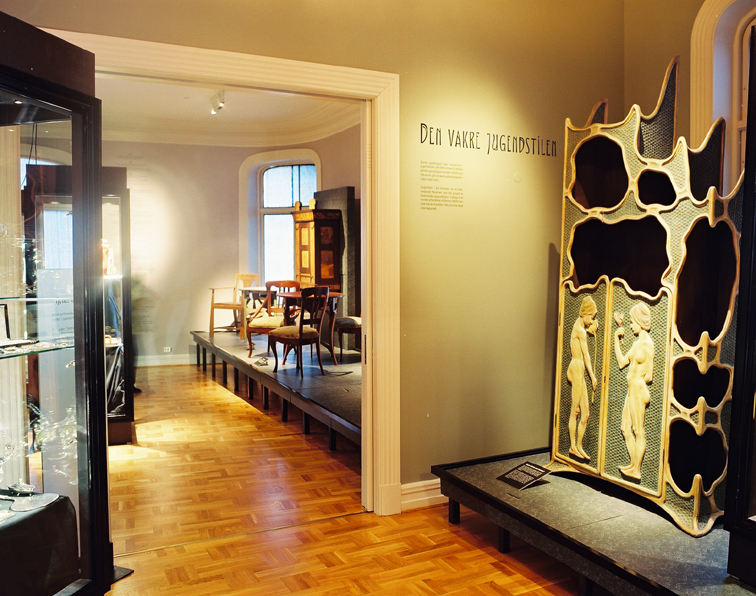 Gjenstandsutstillingen Den vakre jugendstilen. Jugendstilsenteret.